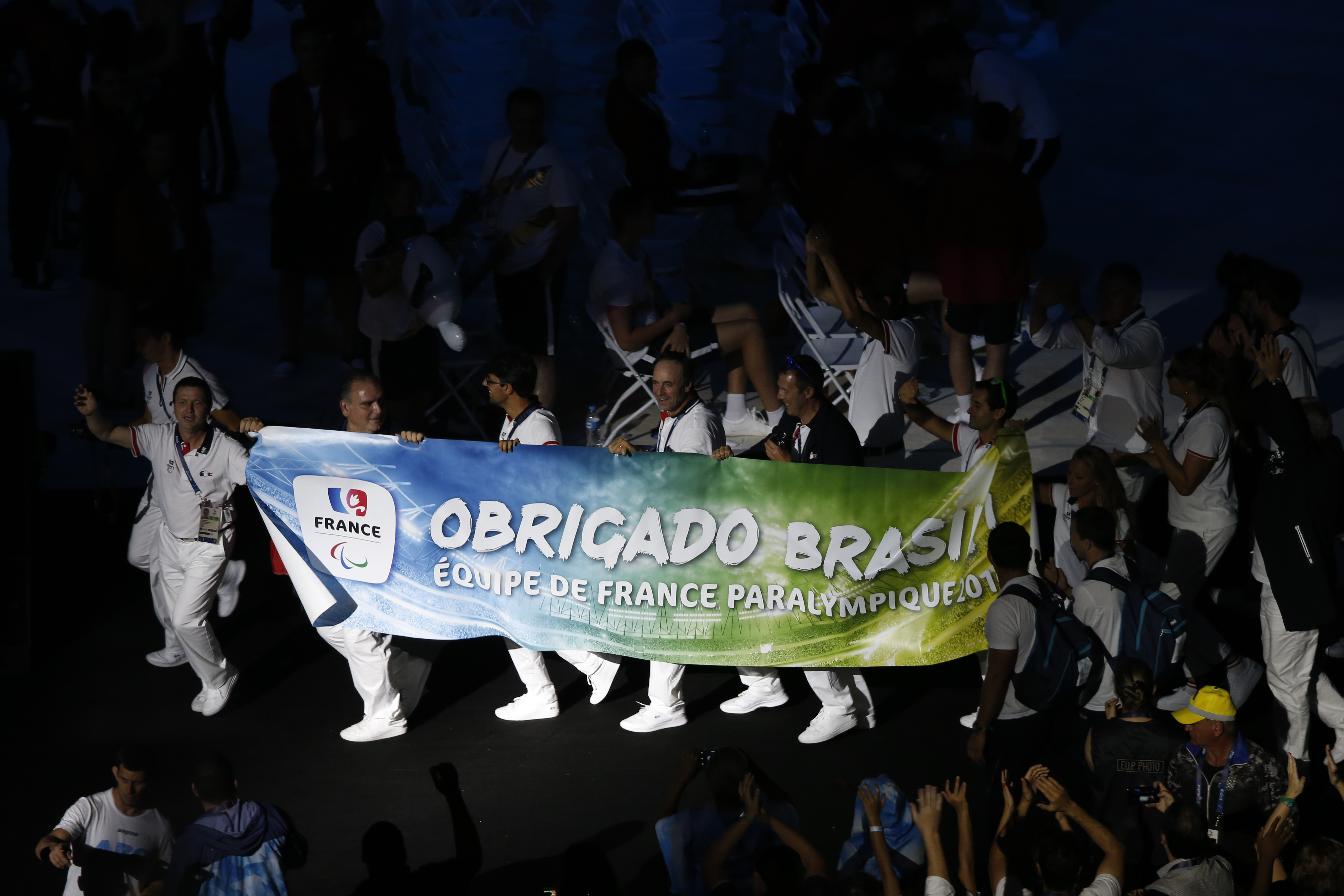 Rio de Janeiro - Cerimônia de encerramento dos Jogos Paralímpicos no Estádio do Maracanã (Fernando Frazão/Agência Brasil)